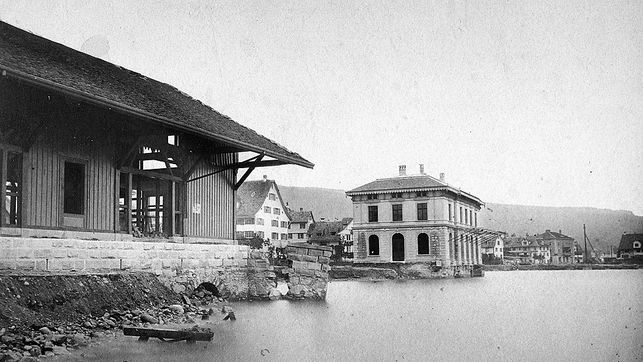 Am 20. September 1875, zwei Tage nach der Einweihung der linksufrigen Zürichseebahn, zeigten sich beim Dampfschiffsteg Horgen Risse. Noch am gleichen Tag versanken drei Gleise der Station mit 6500 Quadratmetern aufgeschüttetem Land im Zürichsee. In den folgenden zwei Tagen verschluckten die Fluten das Toilettenhäuschen. Güterschuppen und Bahnhof hatten sich einen Meter abgesenkt, so dass sie abgebrochen werden mussten.Das Unheil hatte sich schon im Februar abgezeichnet. Eine für das Bahnprojekt erstellte Ufermauer war auf einer Länge von 135 Metern eingestürzt und im See versunken.Monatelang musste das Dampfschiff die Lücke in der neuen Bahnstrecke schliessen. Auf einen neuen Bahnhof am heutigen Standort warteten die Horgner 13 Jahre lang.